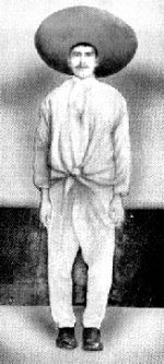 El general zapatista Modesto Rangel